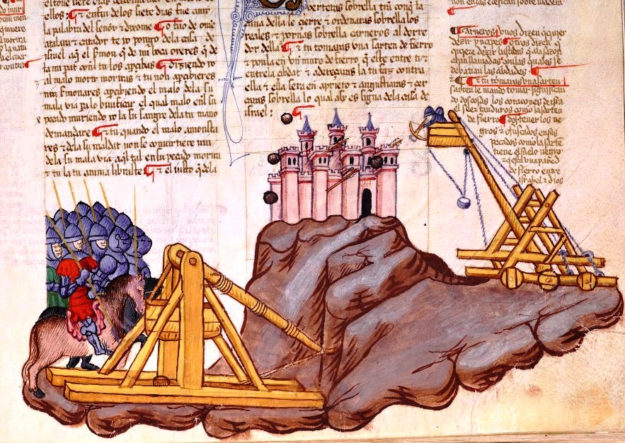 הסתערות יהודה המכבי על החקרא, תנ"ך אלבה.